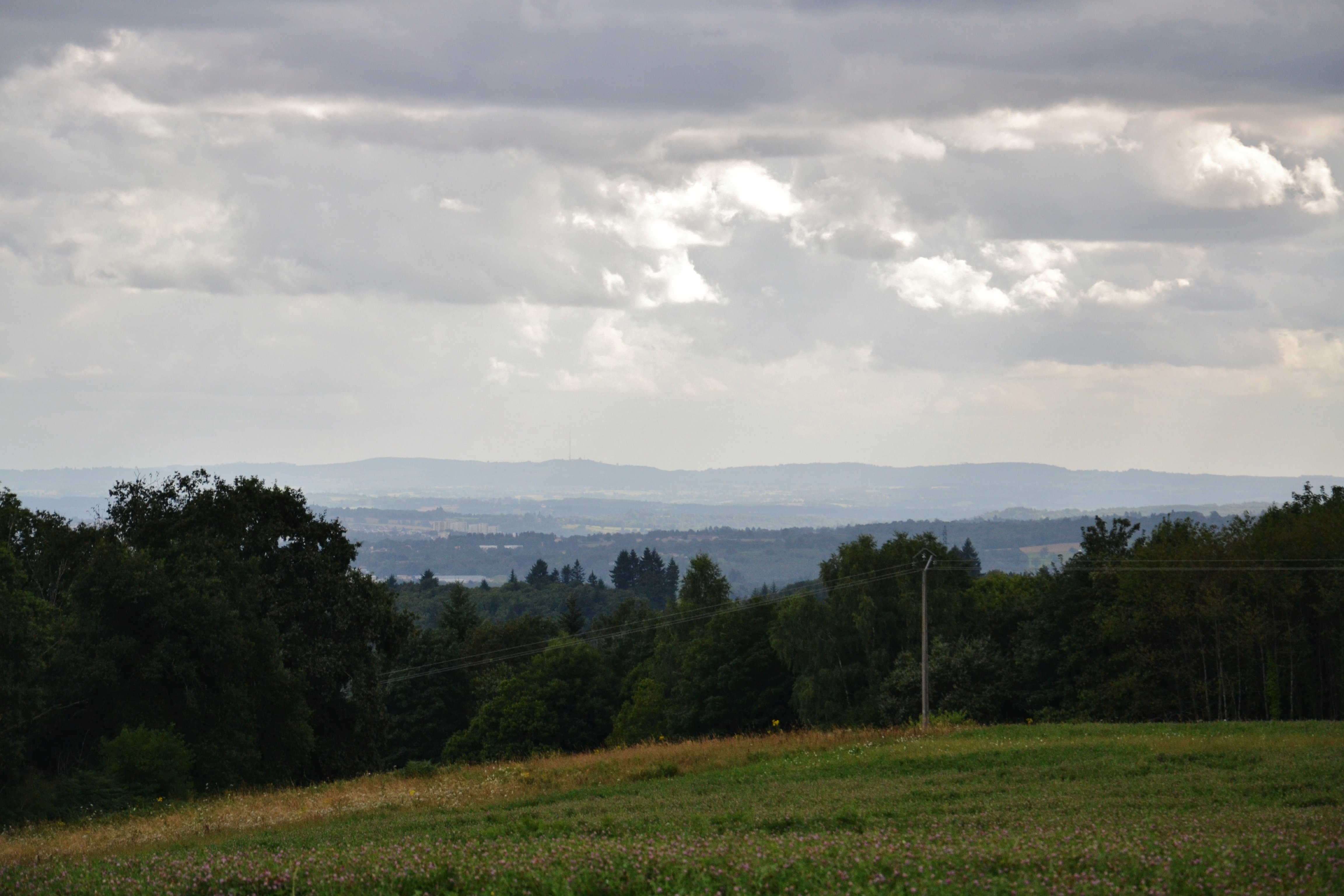 Les hauteurs de la forêt des Cars et de la forêt de Lastours (monts de Châlus) depuis le puy du Fros (537 m.), commune de Saint-Sylvestre (Haute-Vienne, France)